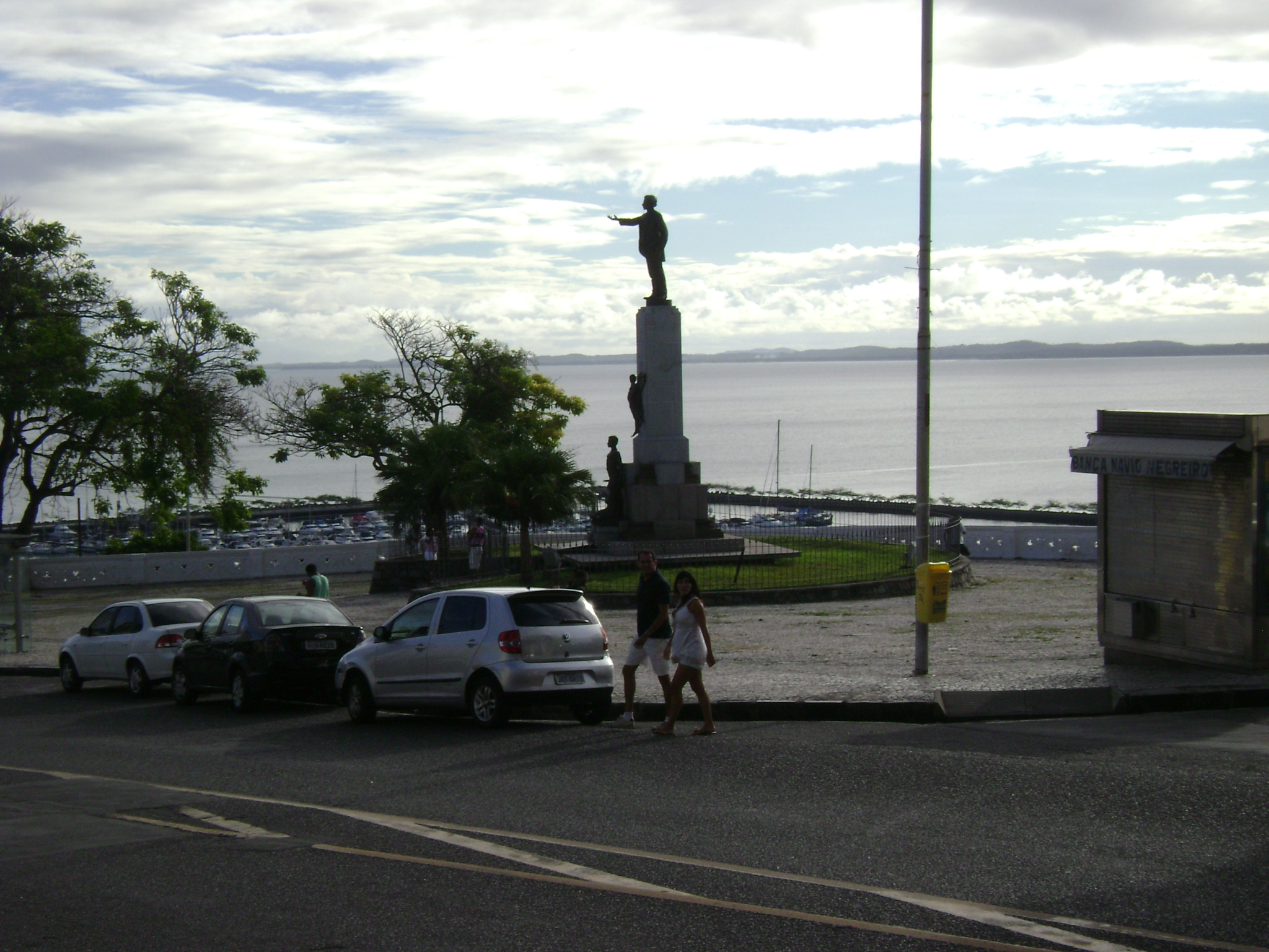 Praça Castro Alves em Salvador, Bahia, Brasil.